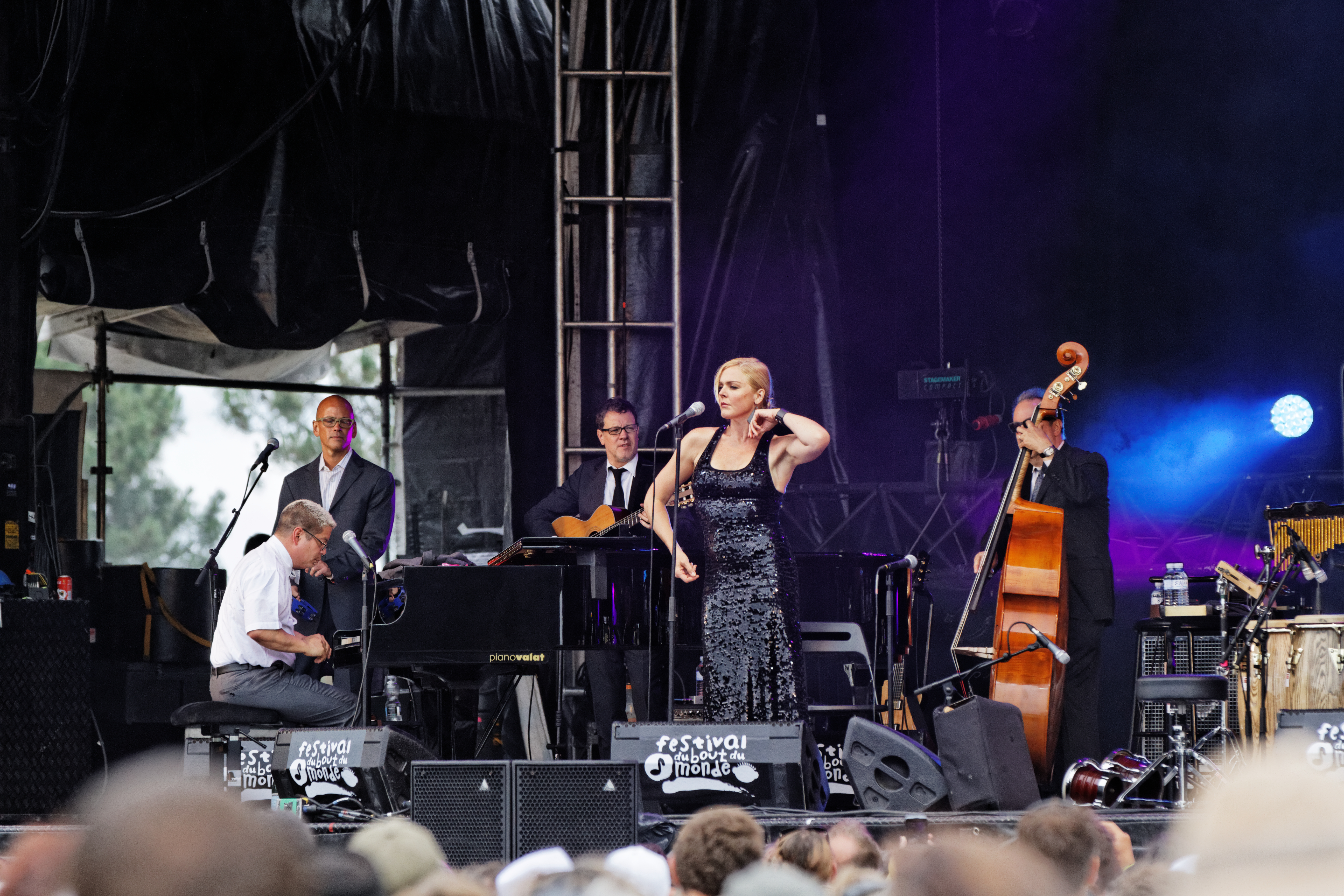 Pink Martini en concert sur la scène Landaoudec lors du festival du bout du Monde à Crozon dans le Finistère (France).